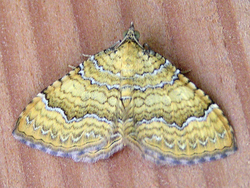 Löwenzahnspanner (Camptogramma bilineata)